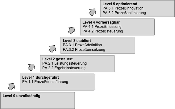 ISO IEC 15504 Reifegrade - deutsch